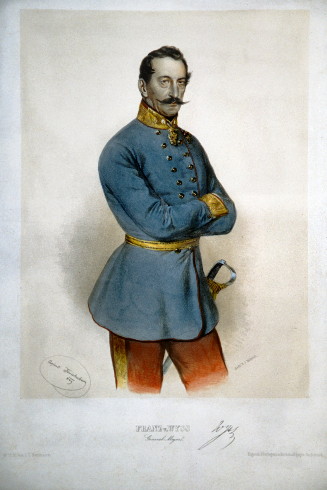 Franz Salomon Edler von Wyss (1796-1849), k. k. Generalmajor Schweizer Abstammung.